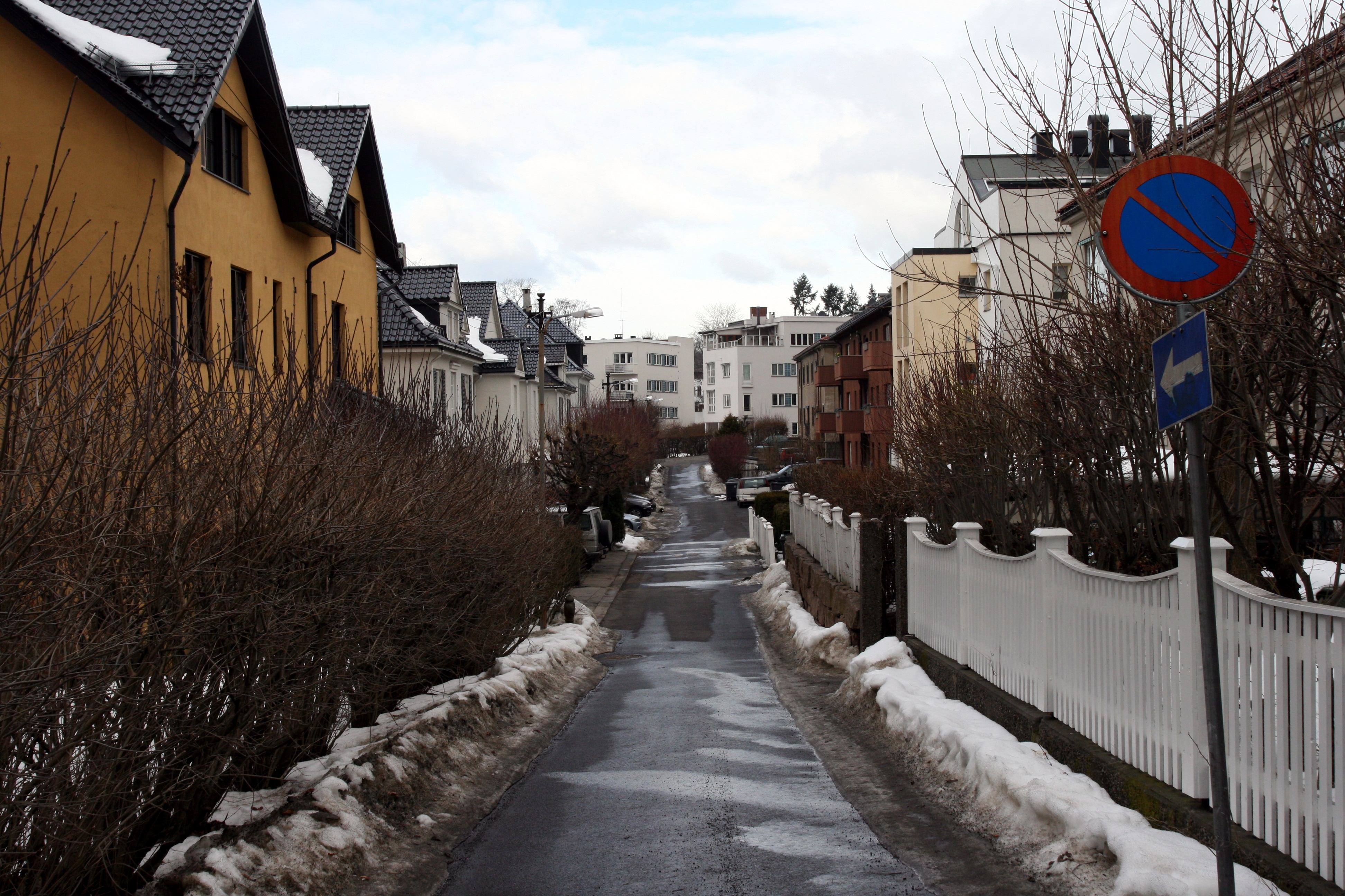 Magnus Barfots gate på Skarpsno i Oslo, sett fra Frøyas gate.